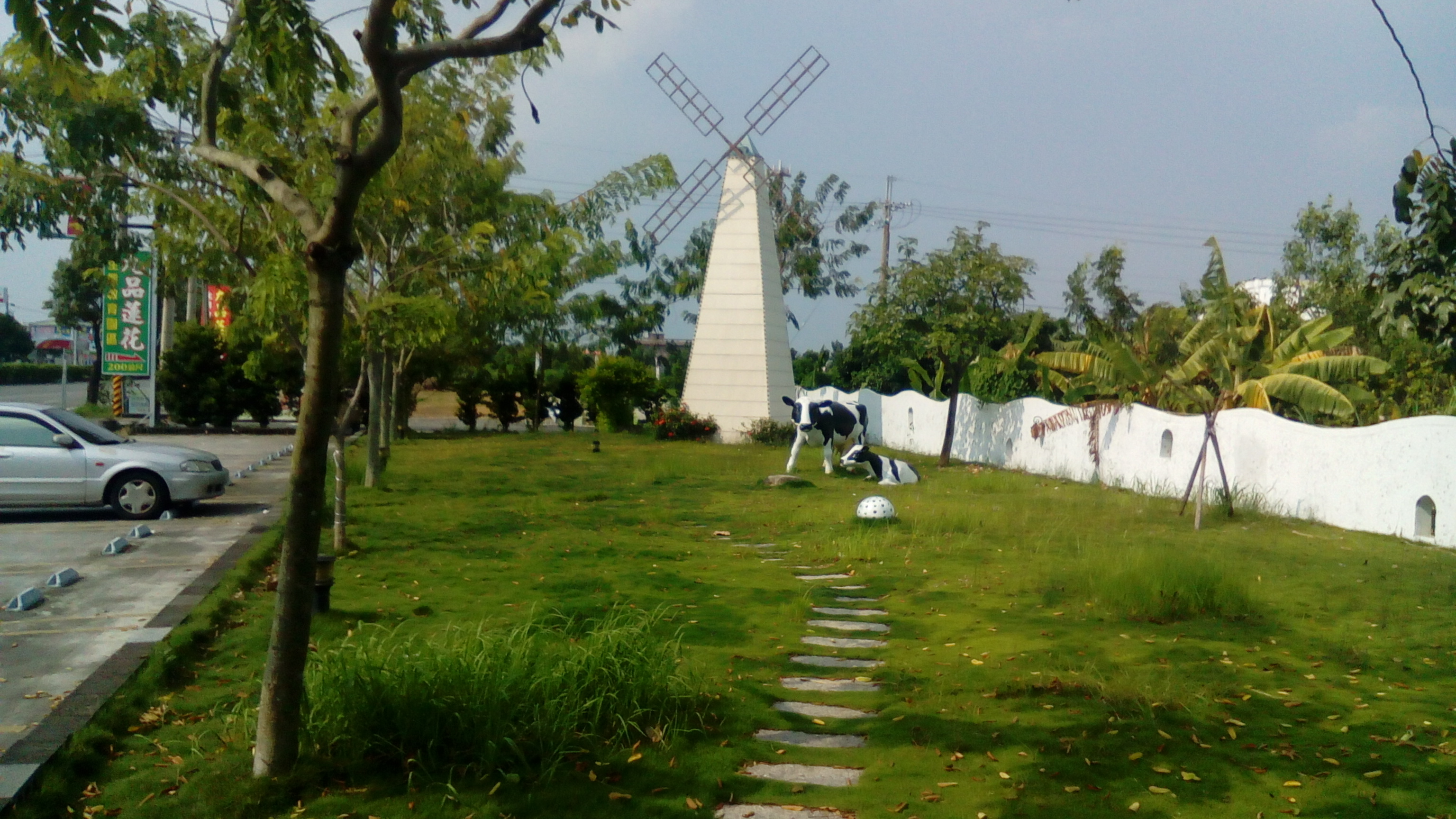 臺南市六甲區 統一超商林鳳營門市之庭園